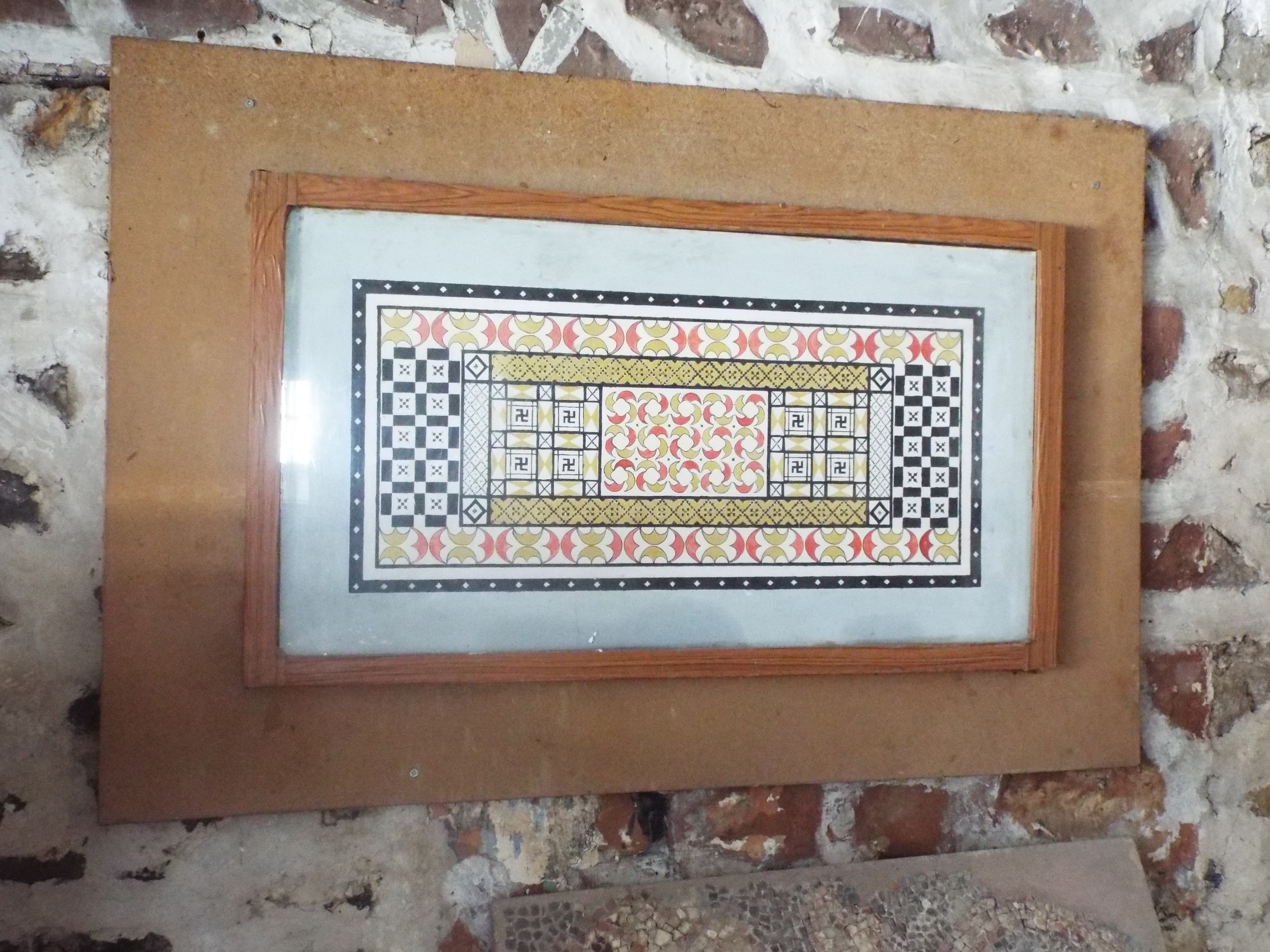 Rindërtimi hipotetik i mozaikut të Polenës, nga Muzeu i Korçës